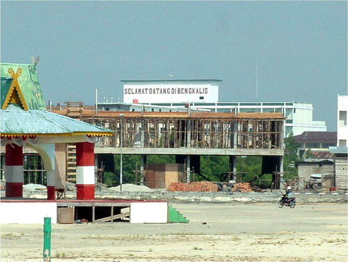 Digunakan pada artikel Kabupaten Bengkalis dari Wikipedia Bahasa Indonesia